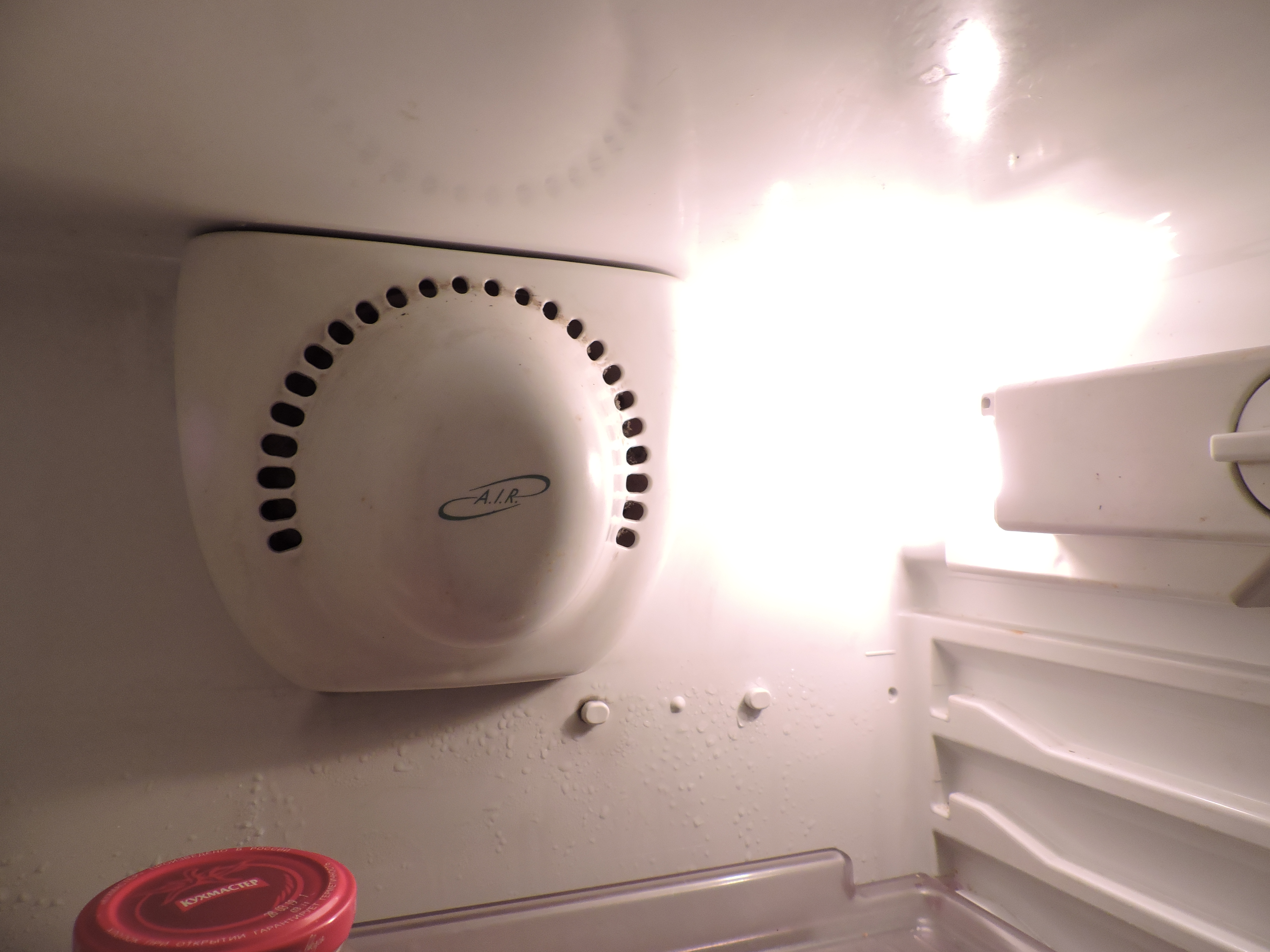 Вентилятор холодильника с системой "No frost"